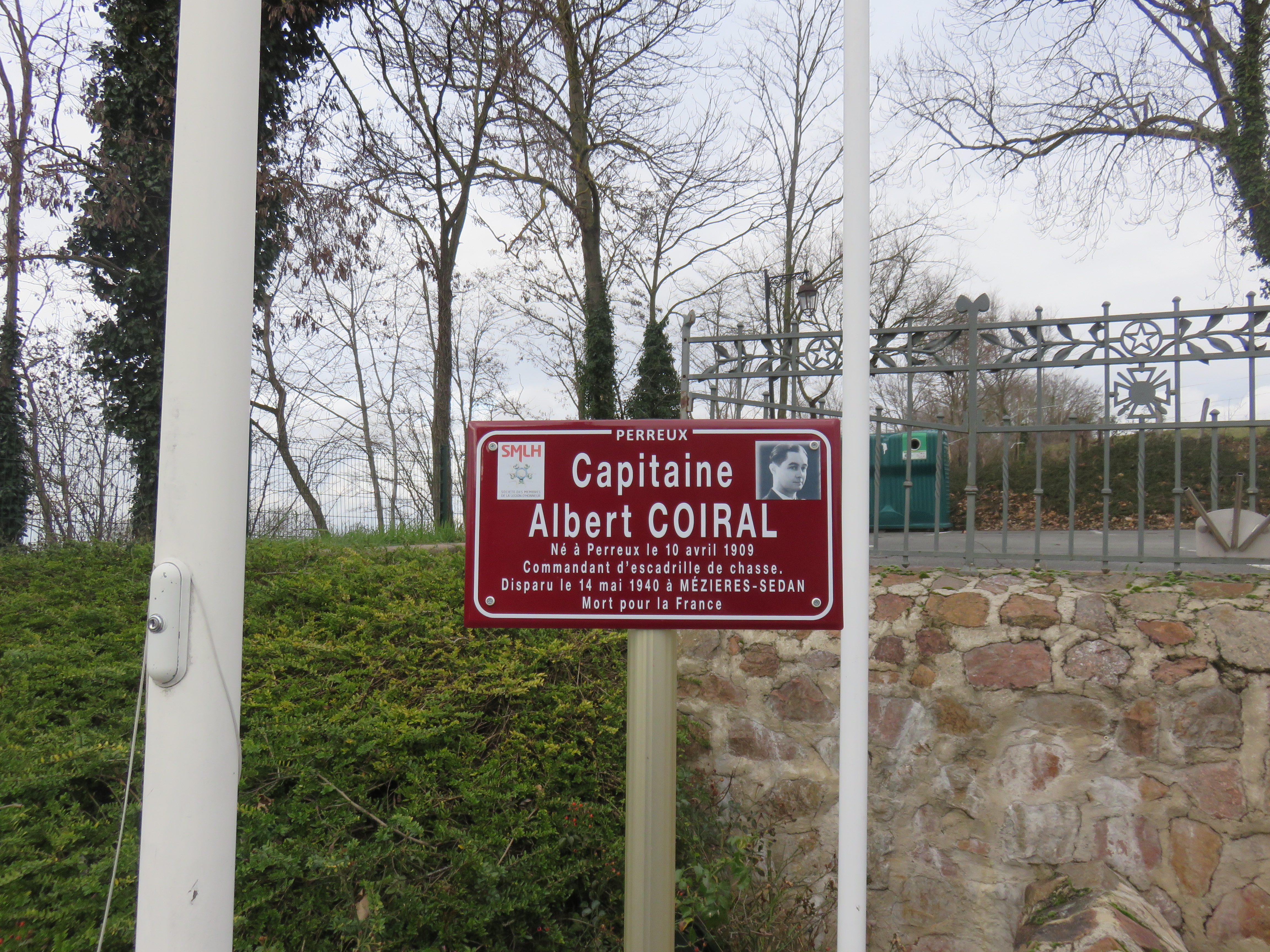 Plaque en hommage au Capitaine Albert Coiral à Perreux (Loire, France) en février 2018.